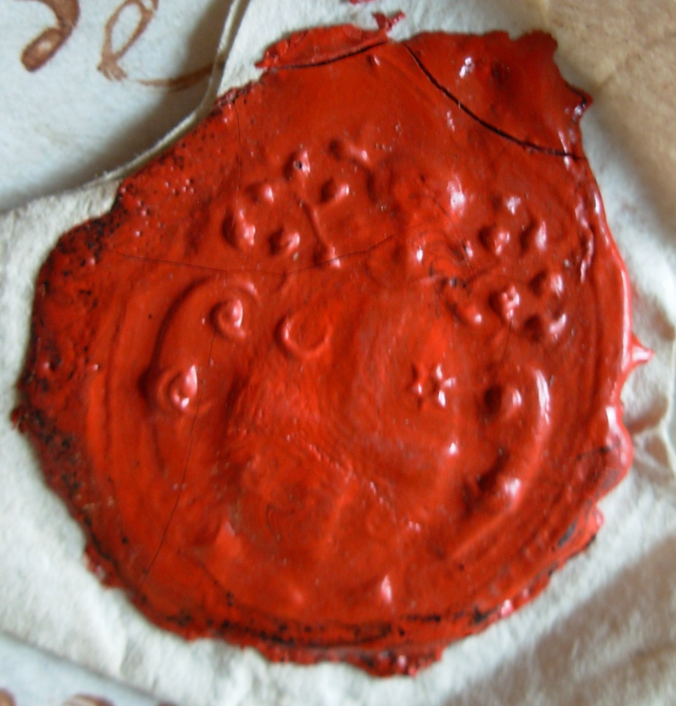 Sceau de David Joseph Dehaynin bailli de Roeulx le 06.02.1736 (A.D. Nord, 51 H 24-141)